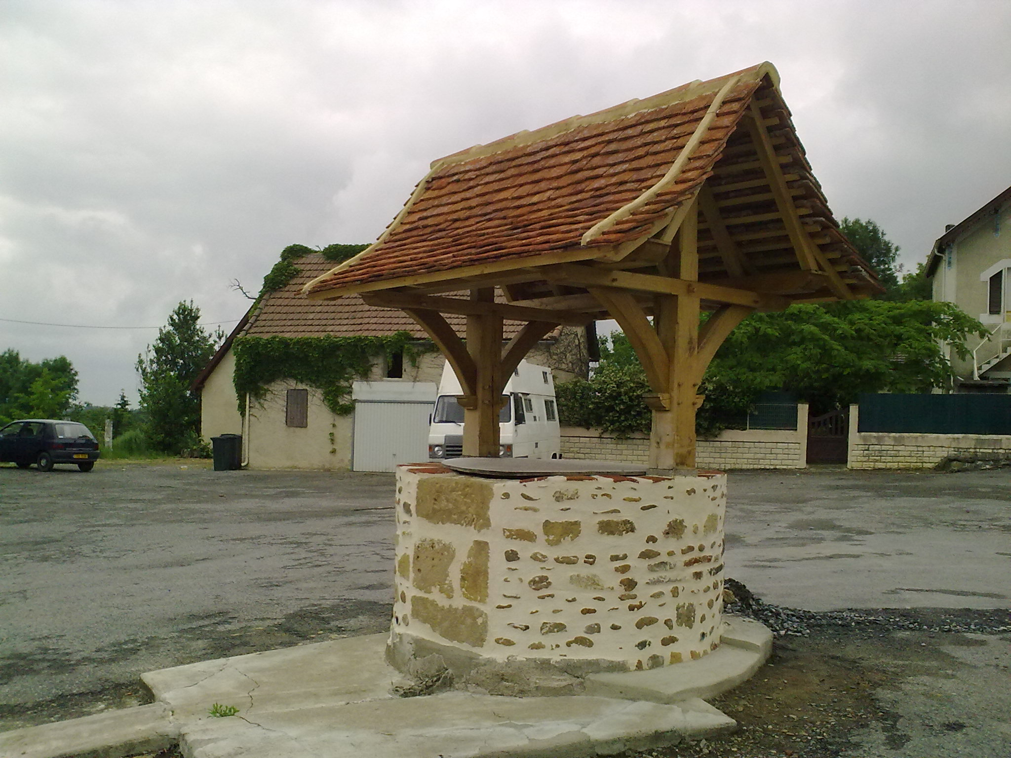 Lembeye